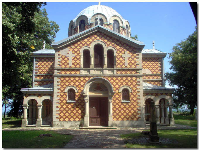 "Russian Church" in Gornji Adrovac, Serbia/L'église russe de Gornji Adrovac, Serbie